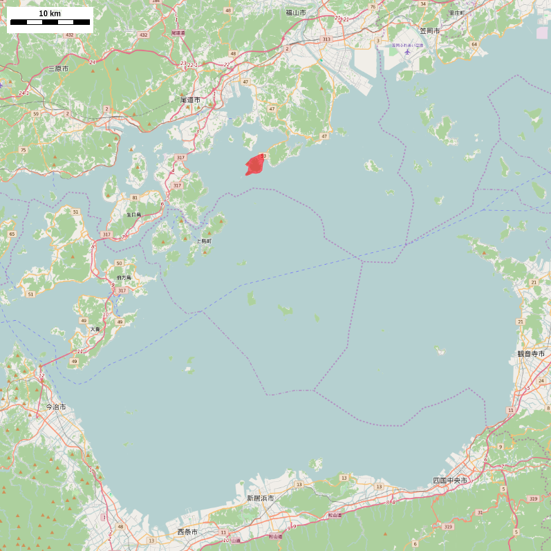 広島県福山市内海町の横島周辺 This map may be incomplete, and may contain errors. Don't rely solely on it for navigation.